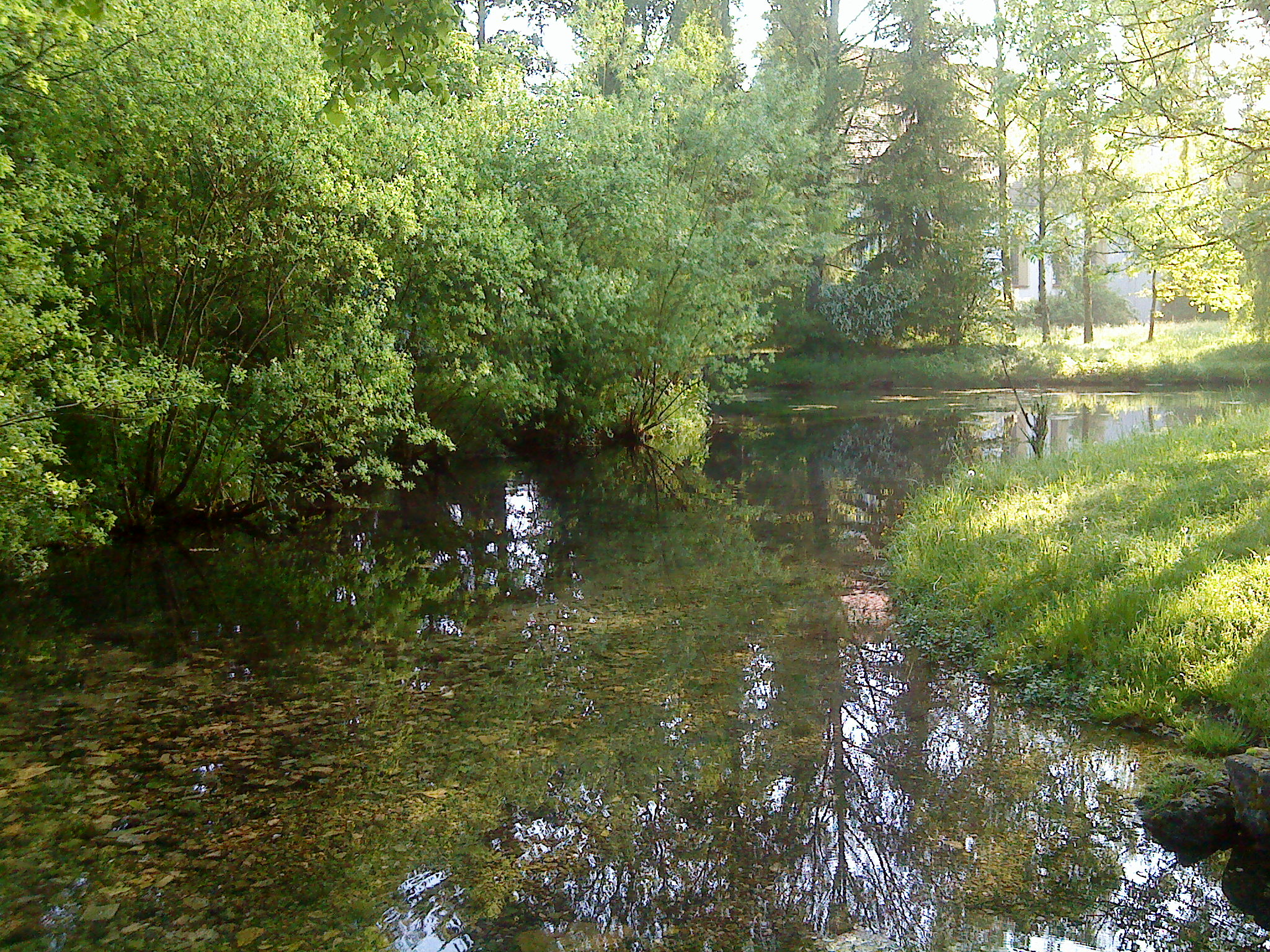 Die Karstquelle "Schambachursprung" in Schamhaupten, Fränkische Alb. Das ca. 8 km lange Trockental oberhalb der Quelle belegt die allmähliche Verkarstung von Quelle und Tal.